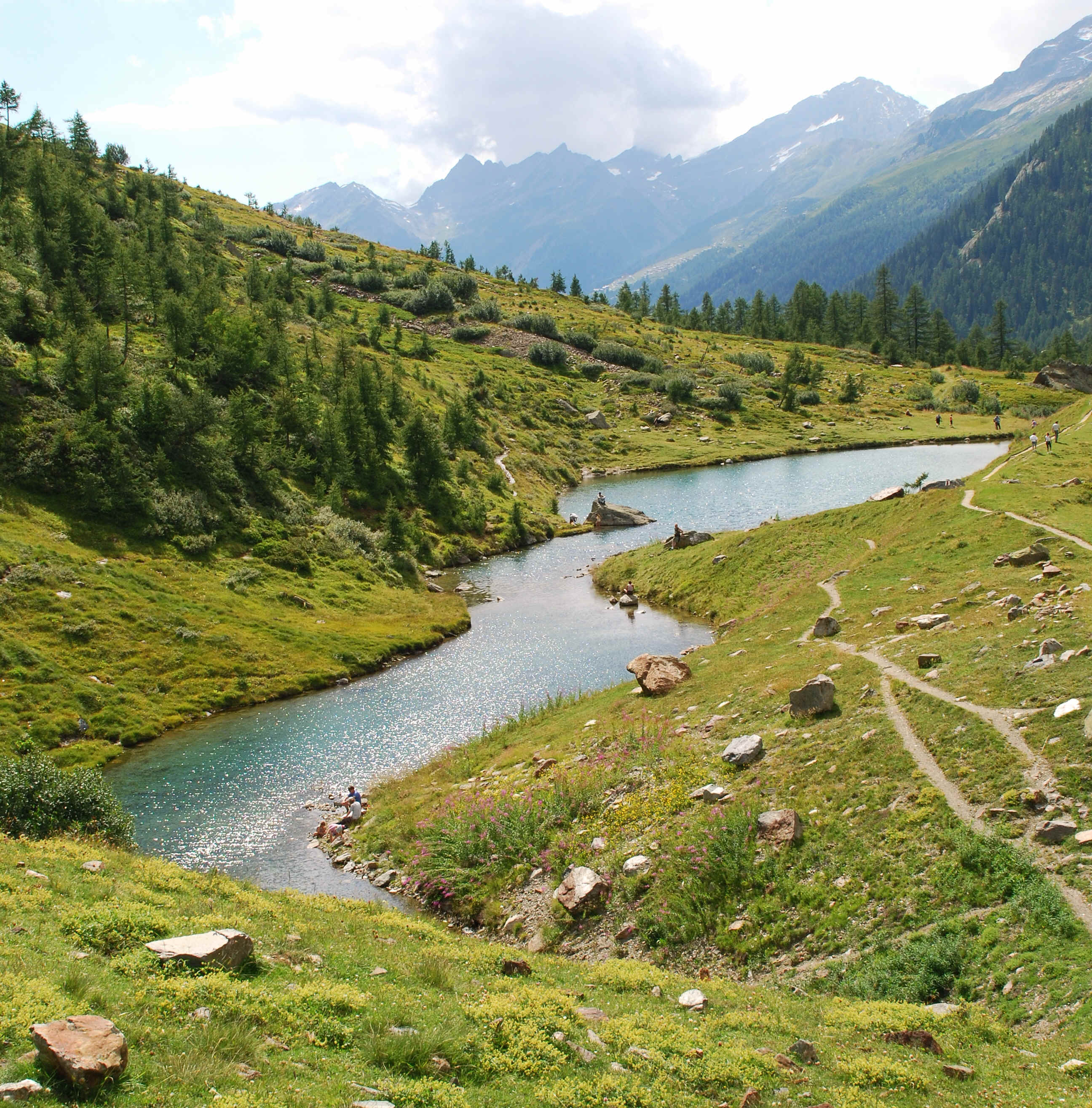 en.: Grundsee at Lötschental, Switzerland; dt.: Grundsee im Lötschental, Schweiz